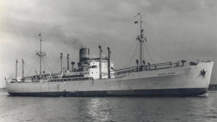 Das Kühlschiff SANTA CRUZ der OPDR, später Hilfskreuzer Thor